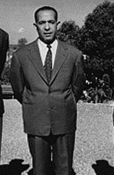 Modification sur le travail avec droits expirés de EdwardHopkins